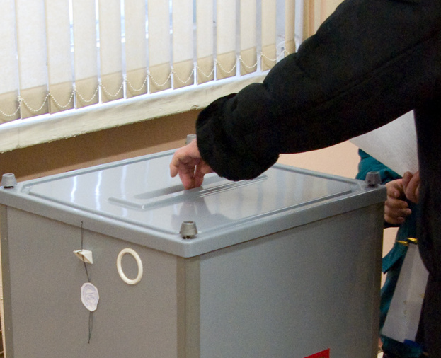 Выборы президента РФ (2008)